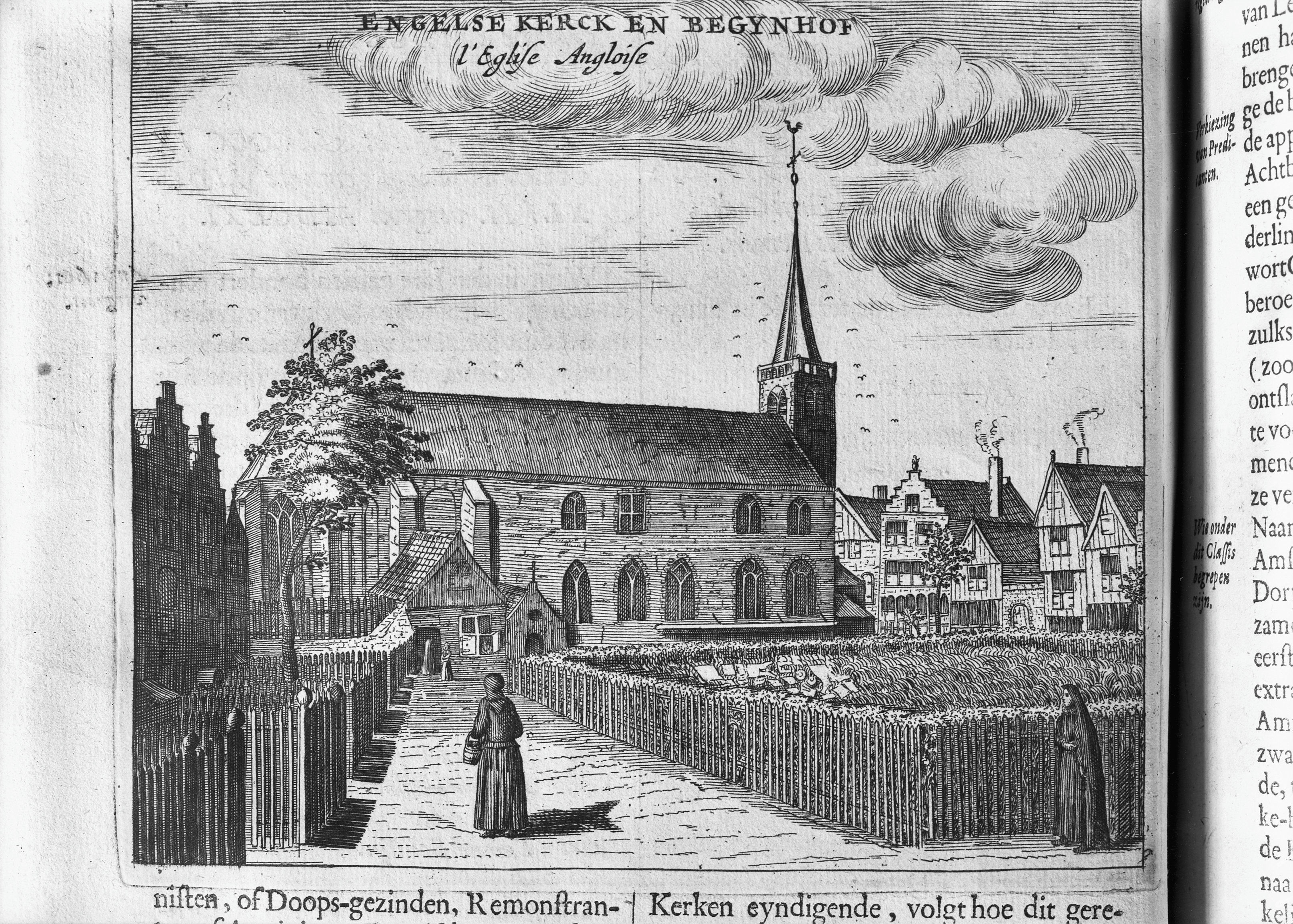 Engelse kerk: Tekening van kerk en begijnhof (opmerking: Reproductie uit: Beschrijvinge van Amsterdam door T. van Domselaer)